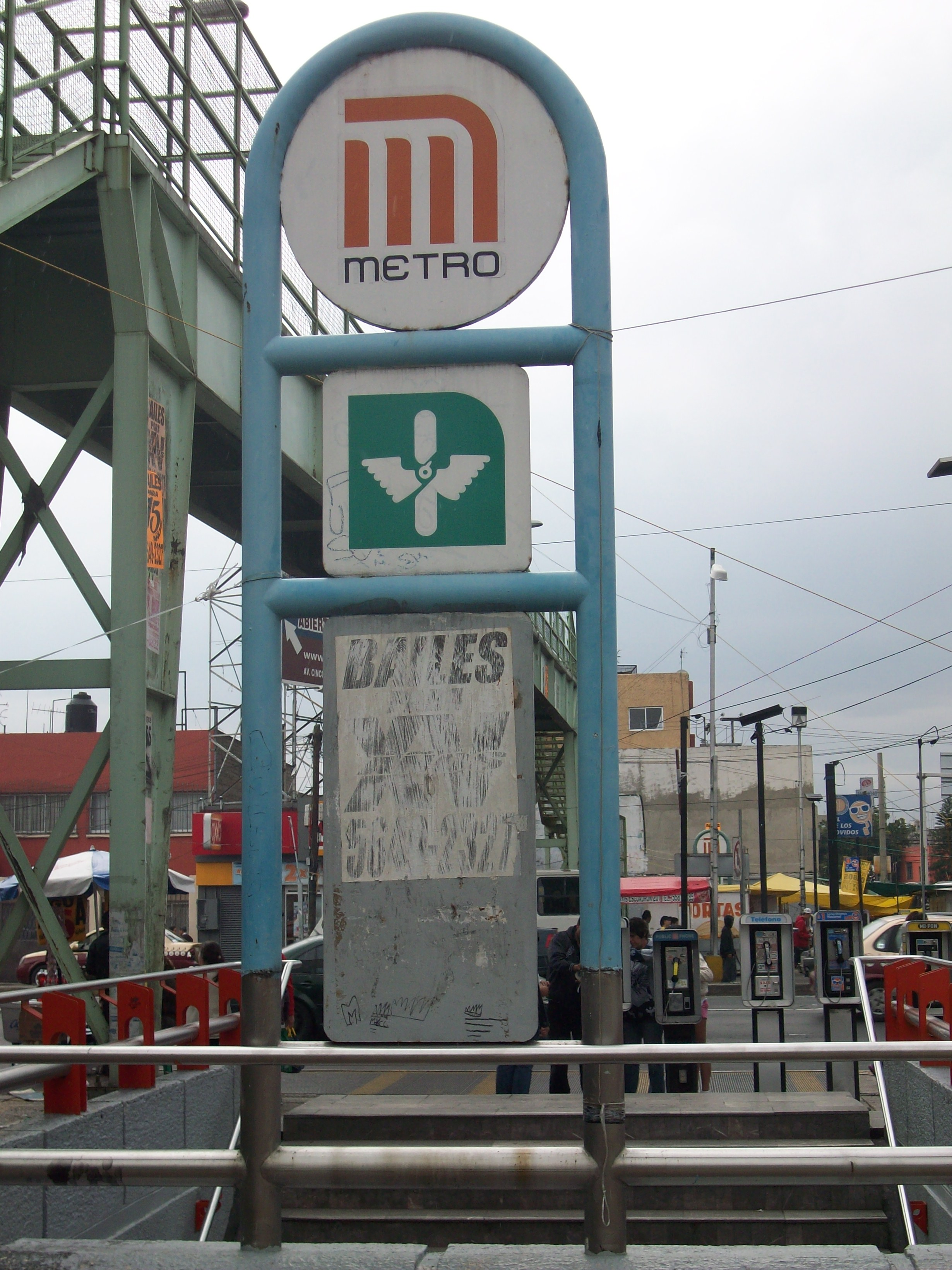 Estela Escuadron 201